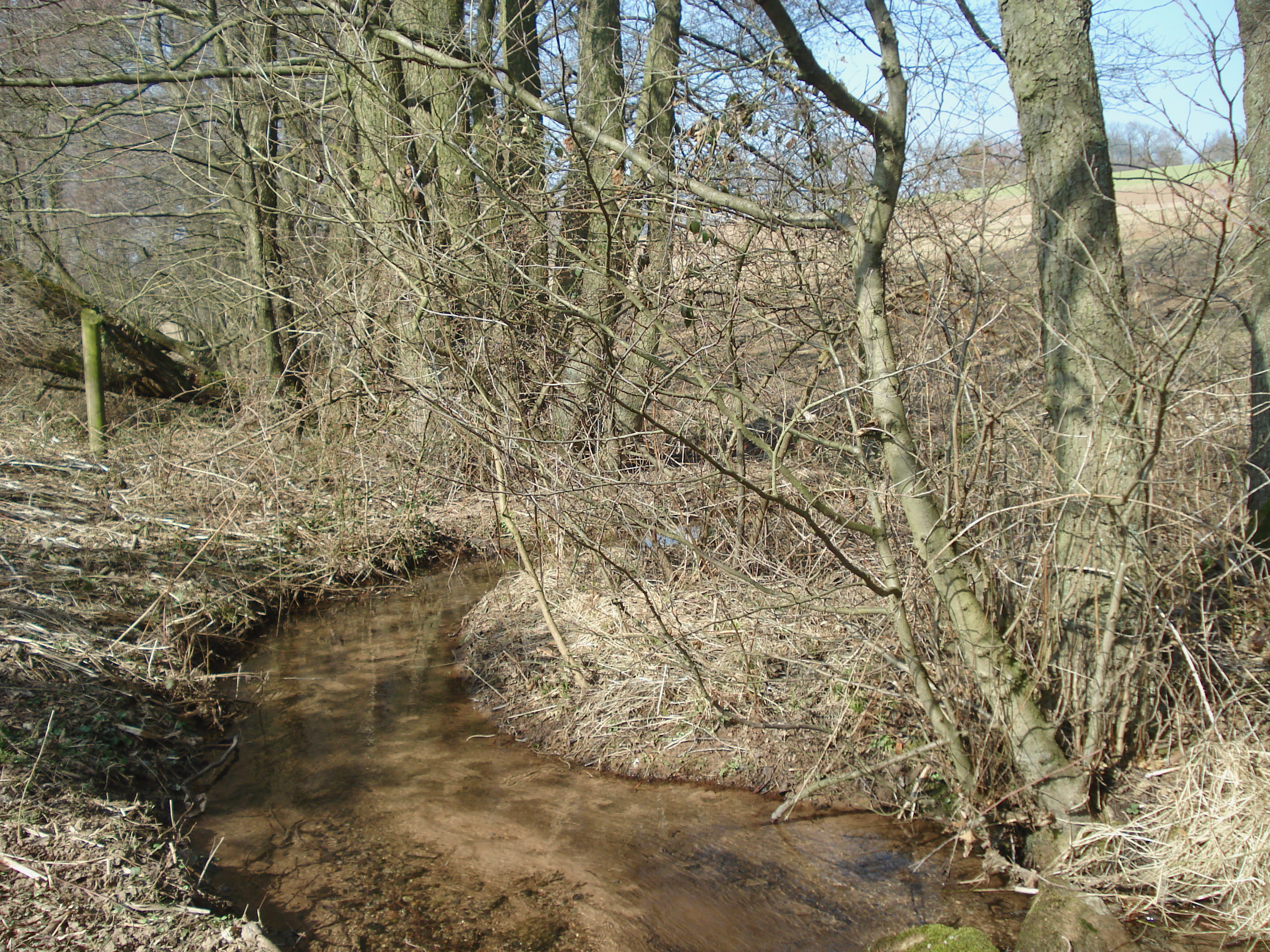 Der Höllenbach vor Schöllkrippen